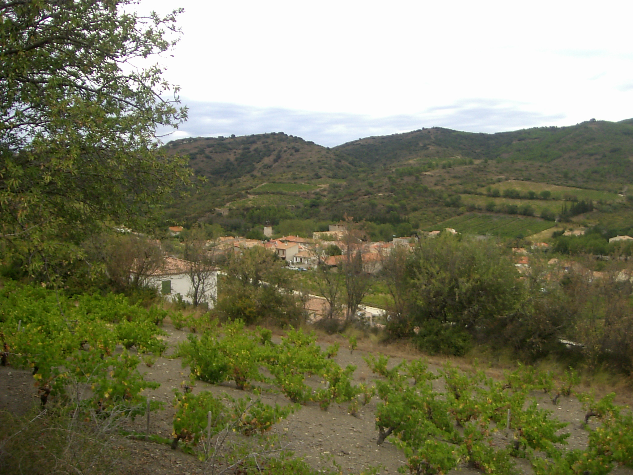 Vue depuis le sud sur Cascastel-des-Corbières